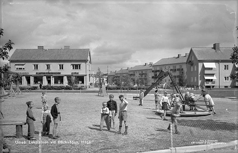 Lekplatsen vid Bäckvägen, Haga.; Bostadsbebyggelse; Byggnadsverk; Lekplats; Parker och trädgårdar